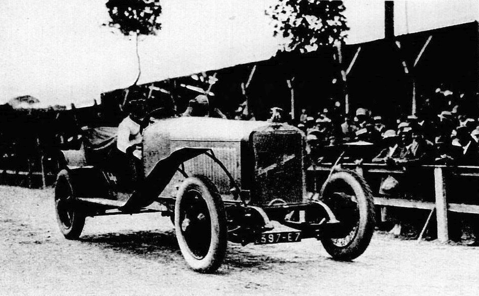 André Dubonnet vainqueur de la première Coupe Georges Boillot en 1921, sur Hispano-Suiza 7L. I6 - Le Monde Illustré du 2 juillet 1921, p.510